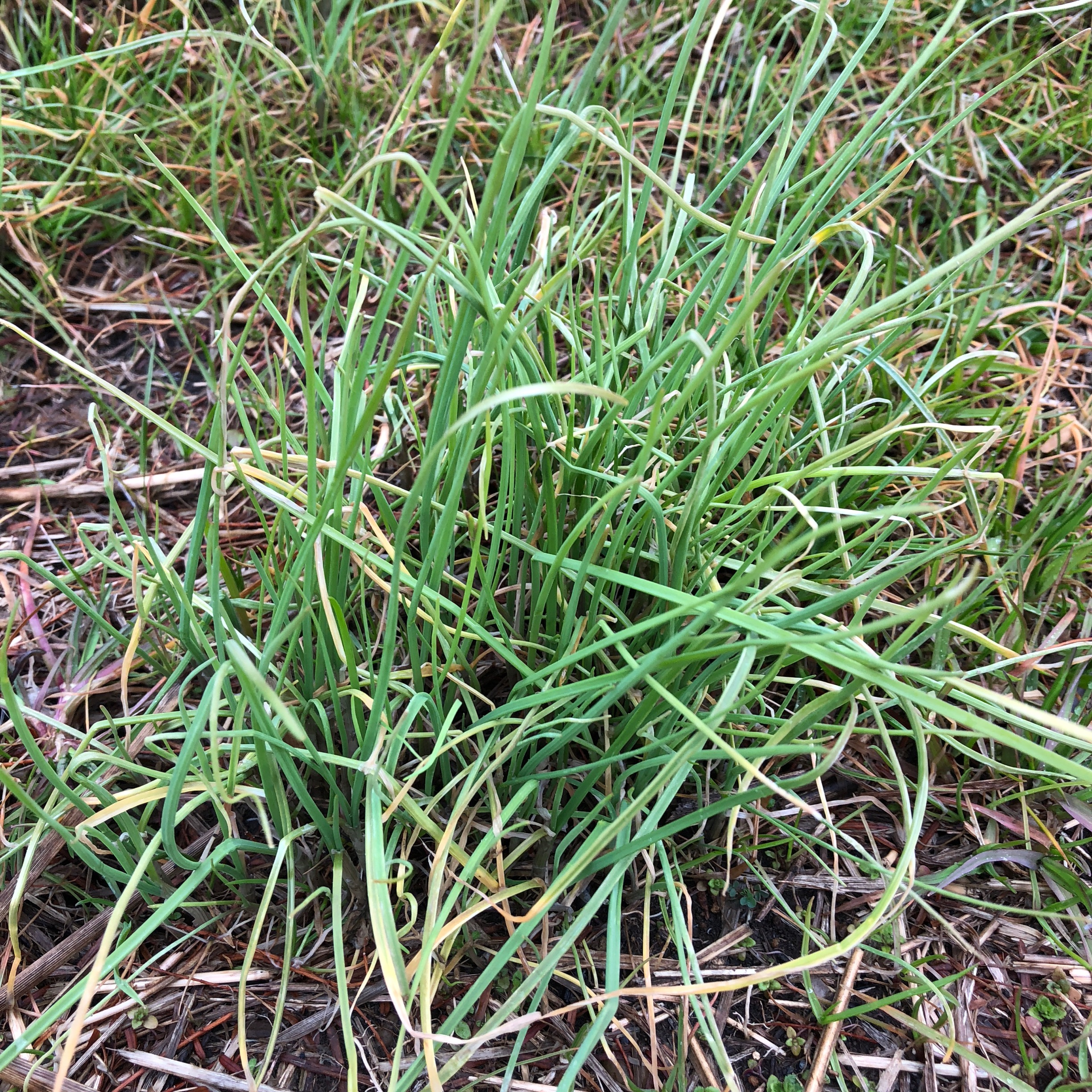 自生するノビル（2018.3.9 埼玉県吉川市江戸川河川敷）